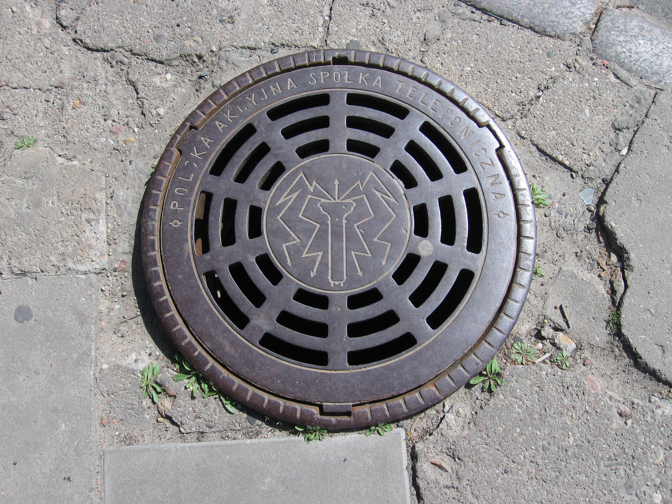 Przedwojenna studzienka Polskiej Akcyjnej Spółki Telefonicznej, Plac Grzybowski, Warszawa